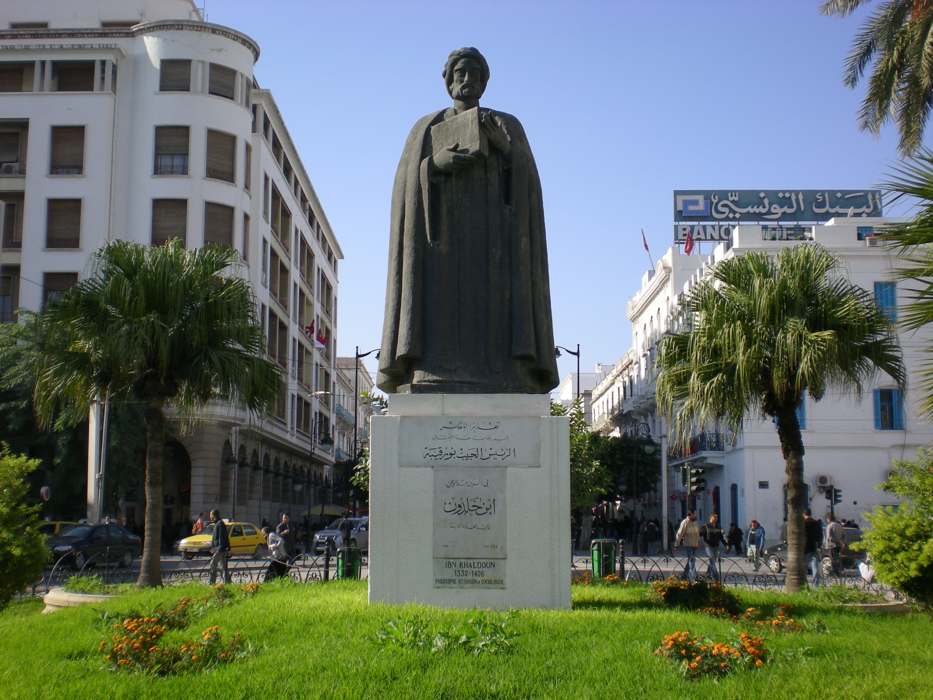 Statue d'Ibn Khaldoun sur l'avenue habib Bourguiba à Tunis